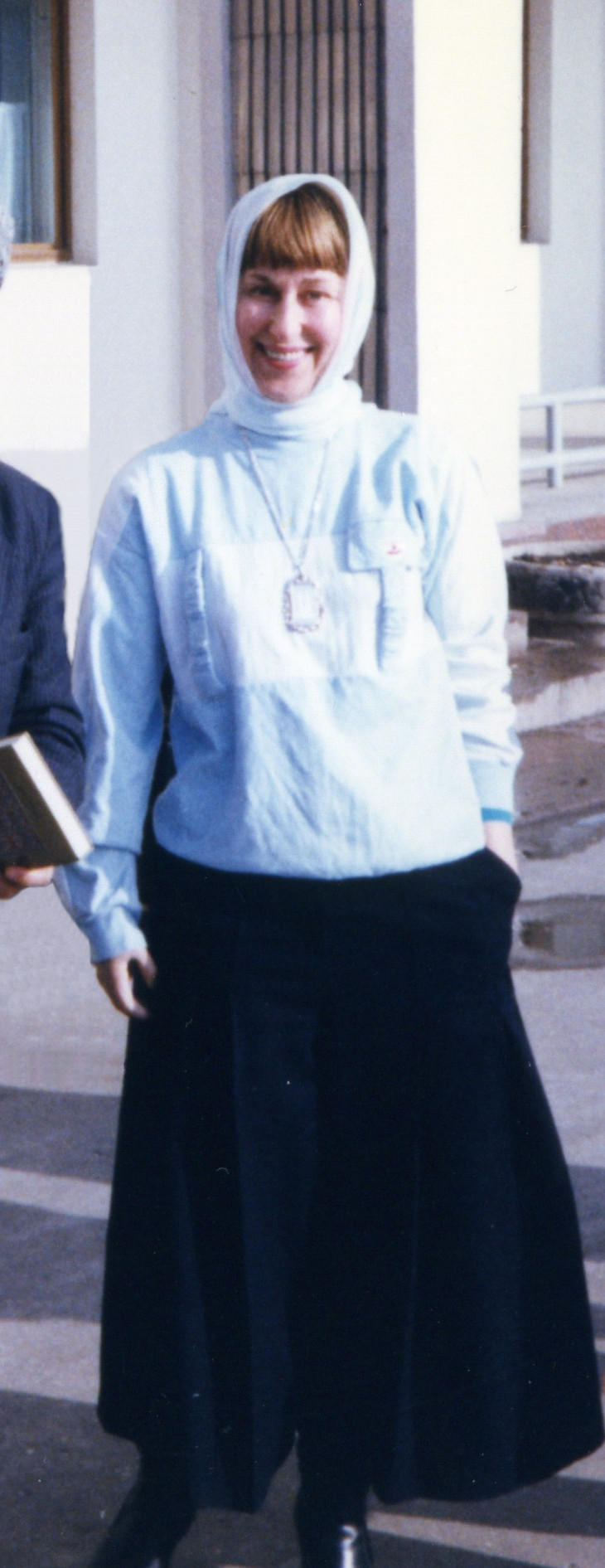 Russian translater